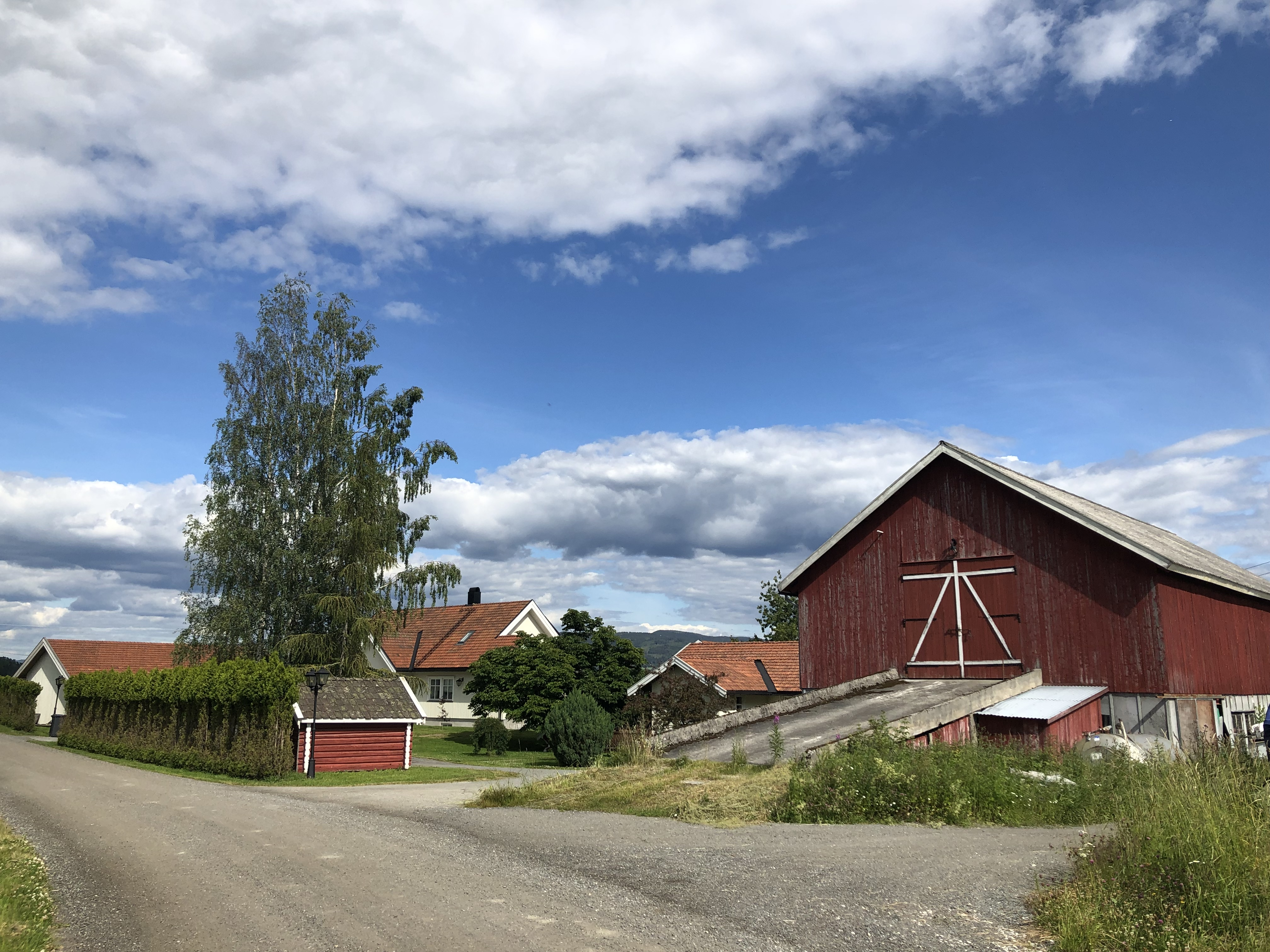 Søndre Sørum gård i Sørumsmarka i Ringerike, 2019.